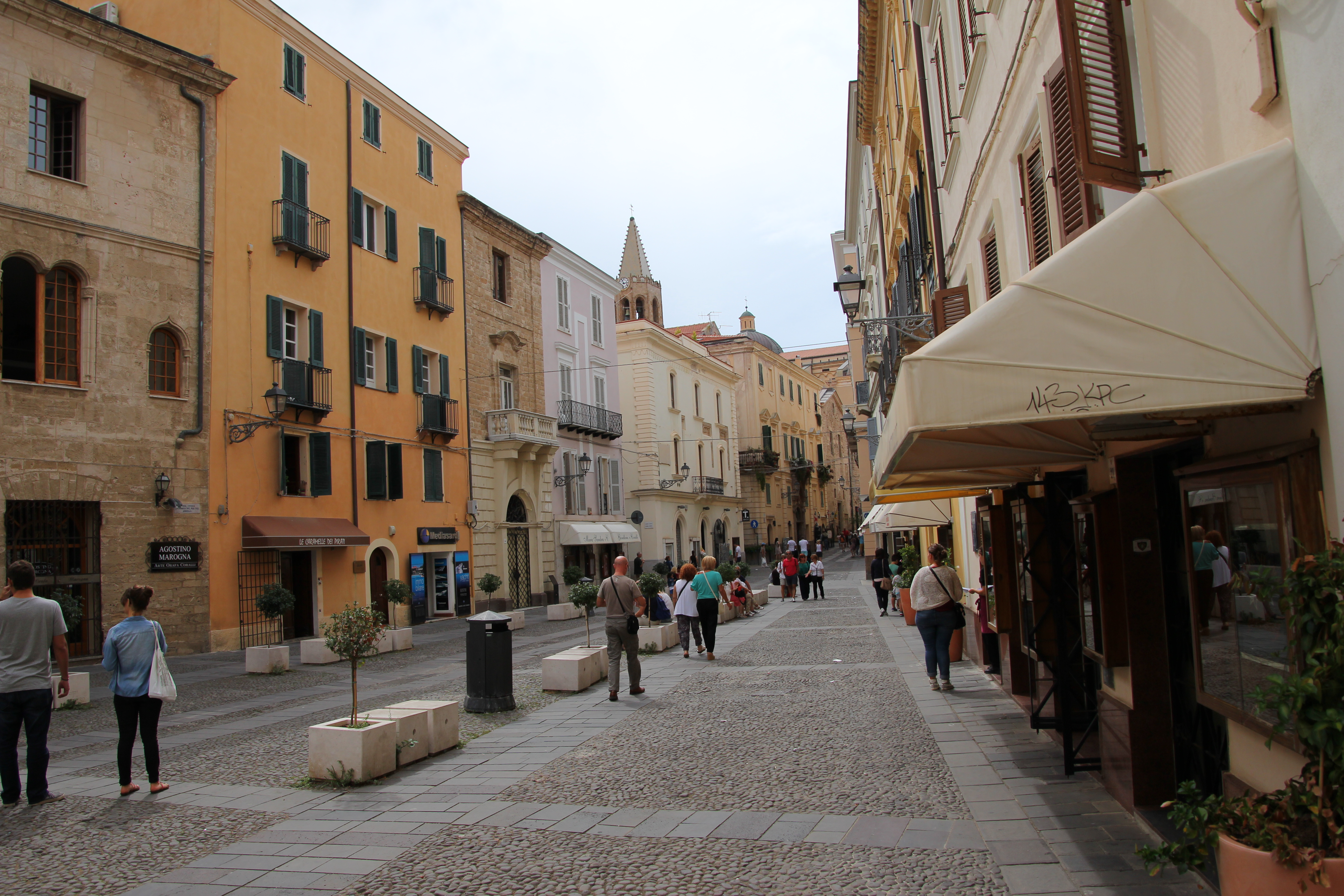 Alghero - Piazza Civica